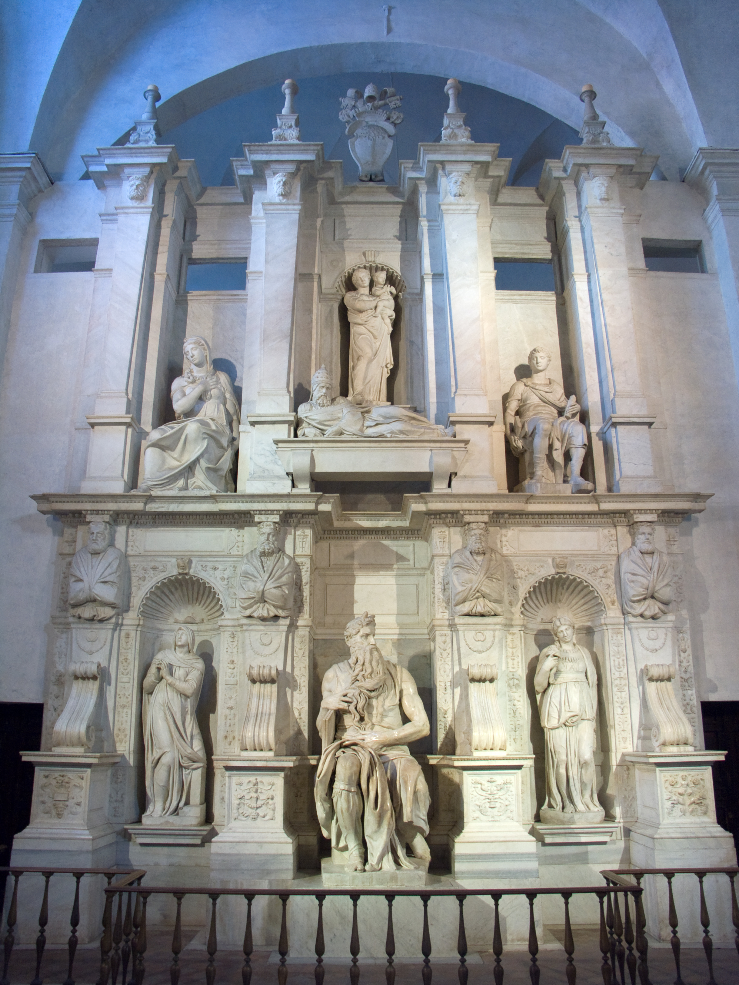 Rome, Basilique San Pietro in Vincoli, Moïse de Michel Ange